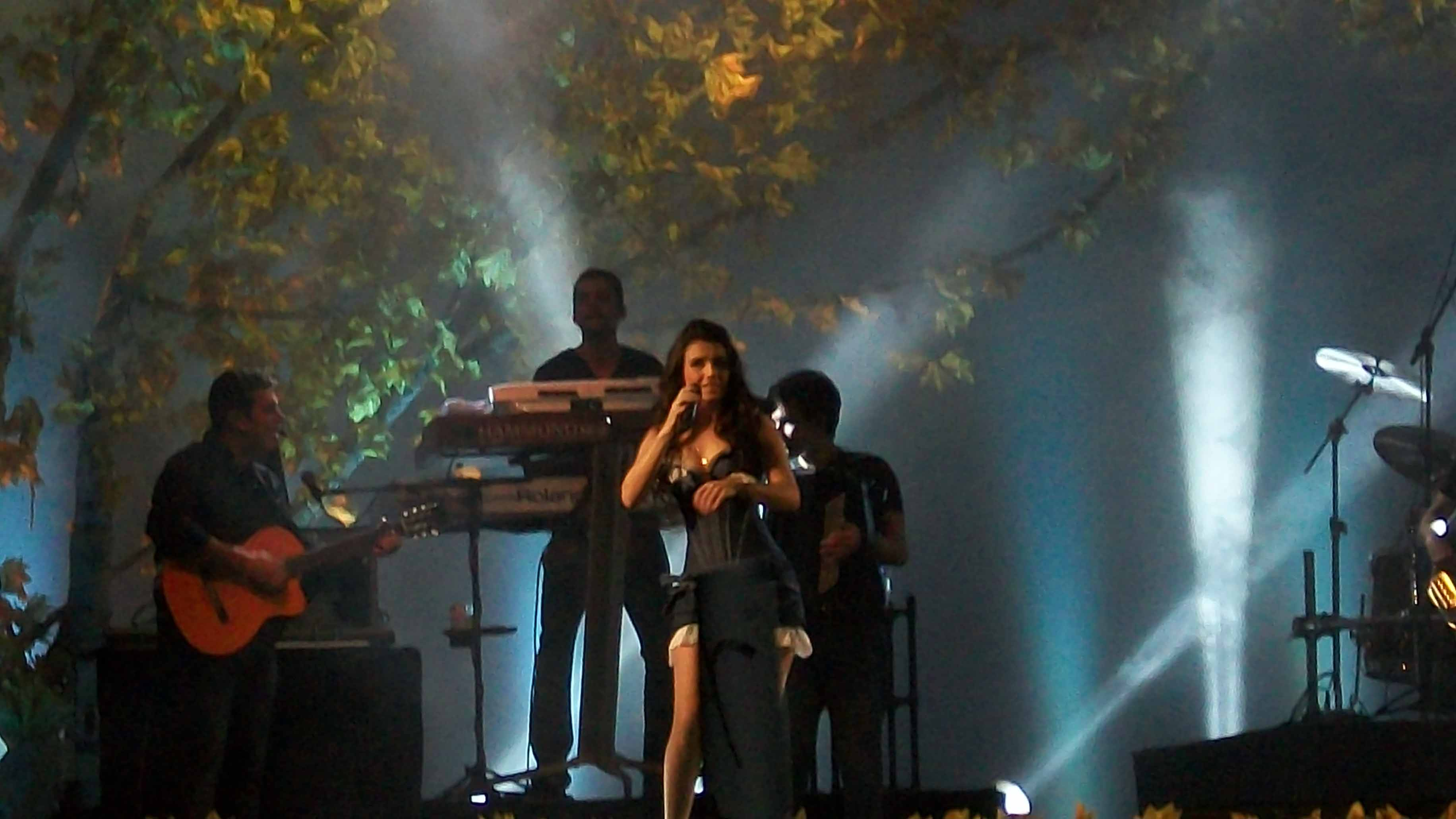 Show da cantora brasileira Paula Fernandes em Birigui em 14 de agosto de 2011.